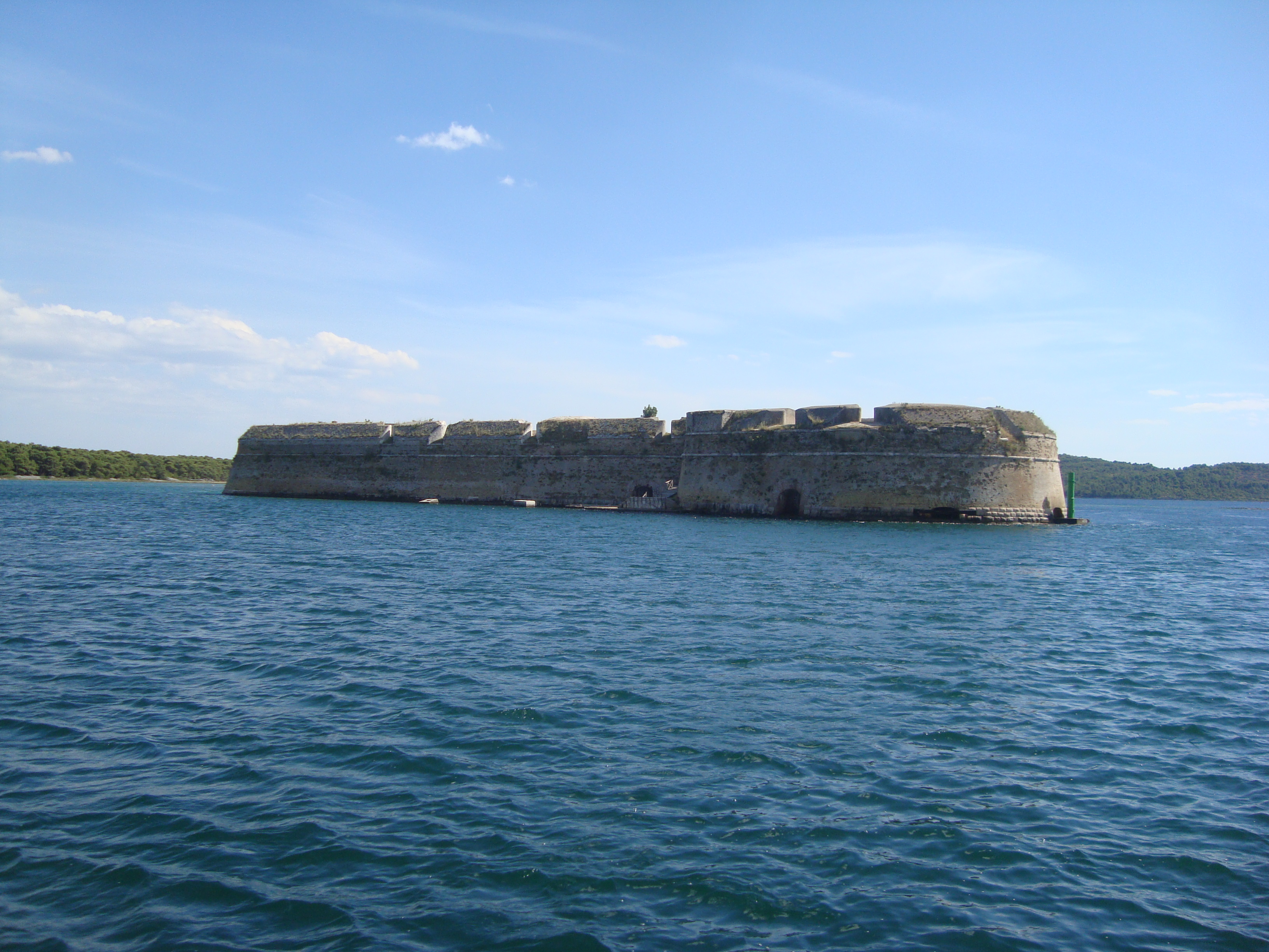 La forteresse Saint-Nicolas de Sibenik.